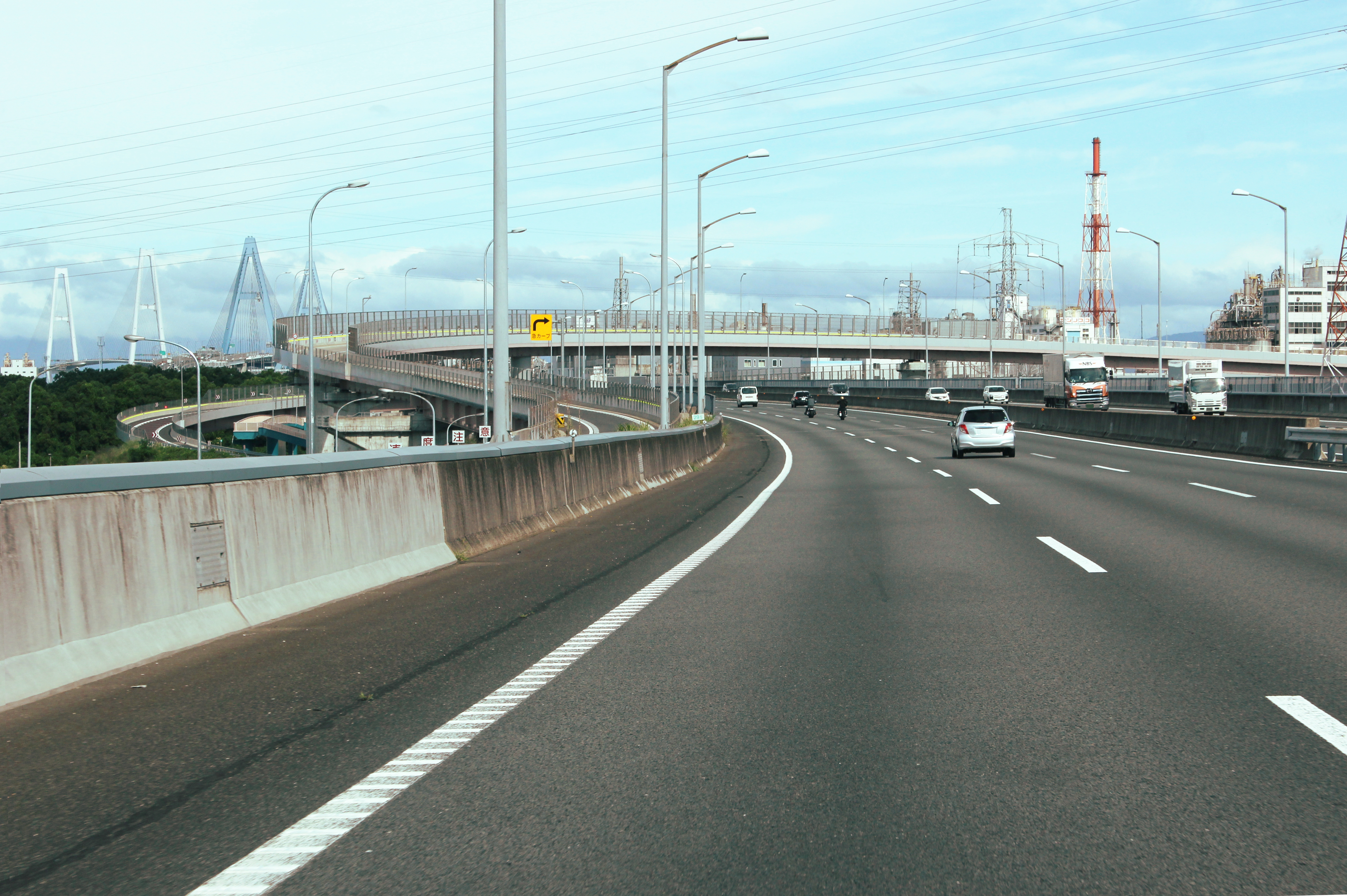 伊勢湾岸自動車道・名高速・西知多産業道路 東海JCT